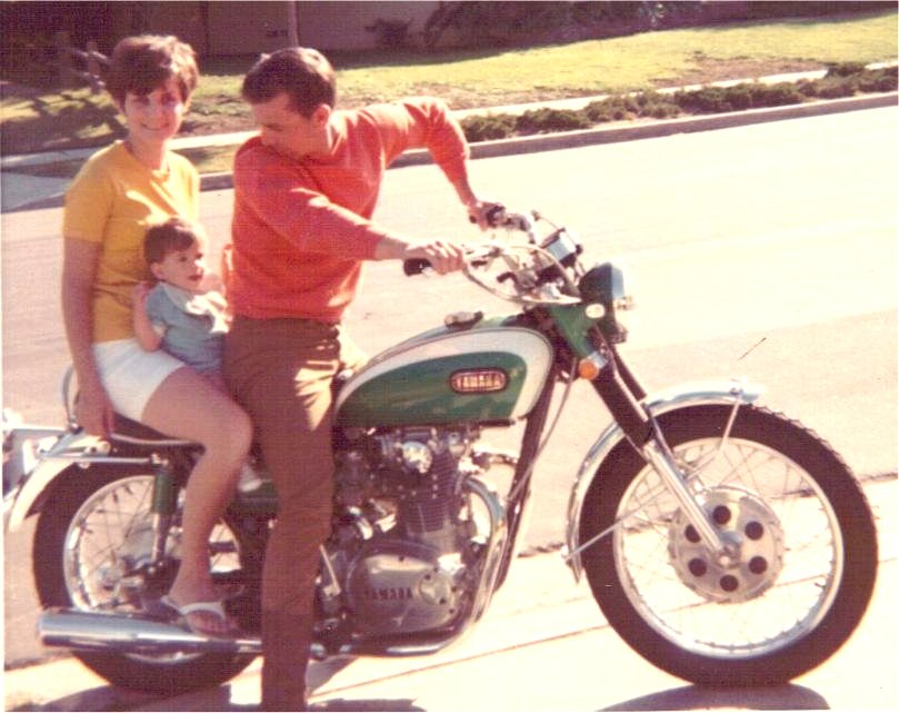 Yamaha XS 650 prima serie del 1969